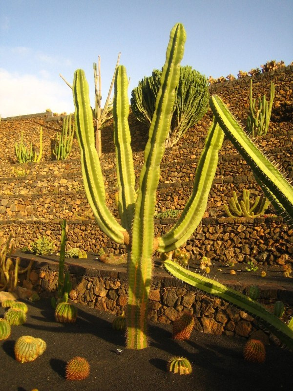 Neoraimondia Herzogiana en el jardín de Cactus de Lanzarote. (sinónimo: Neocardesiana Herzogiana)